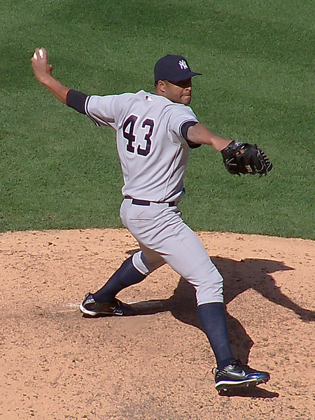 Dámaso Marté